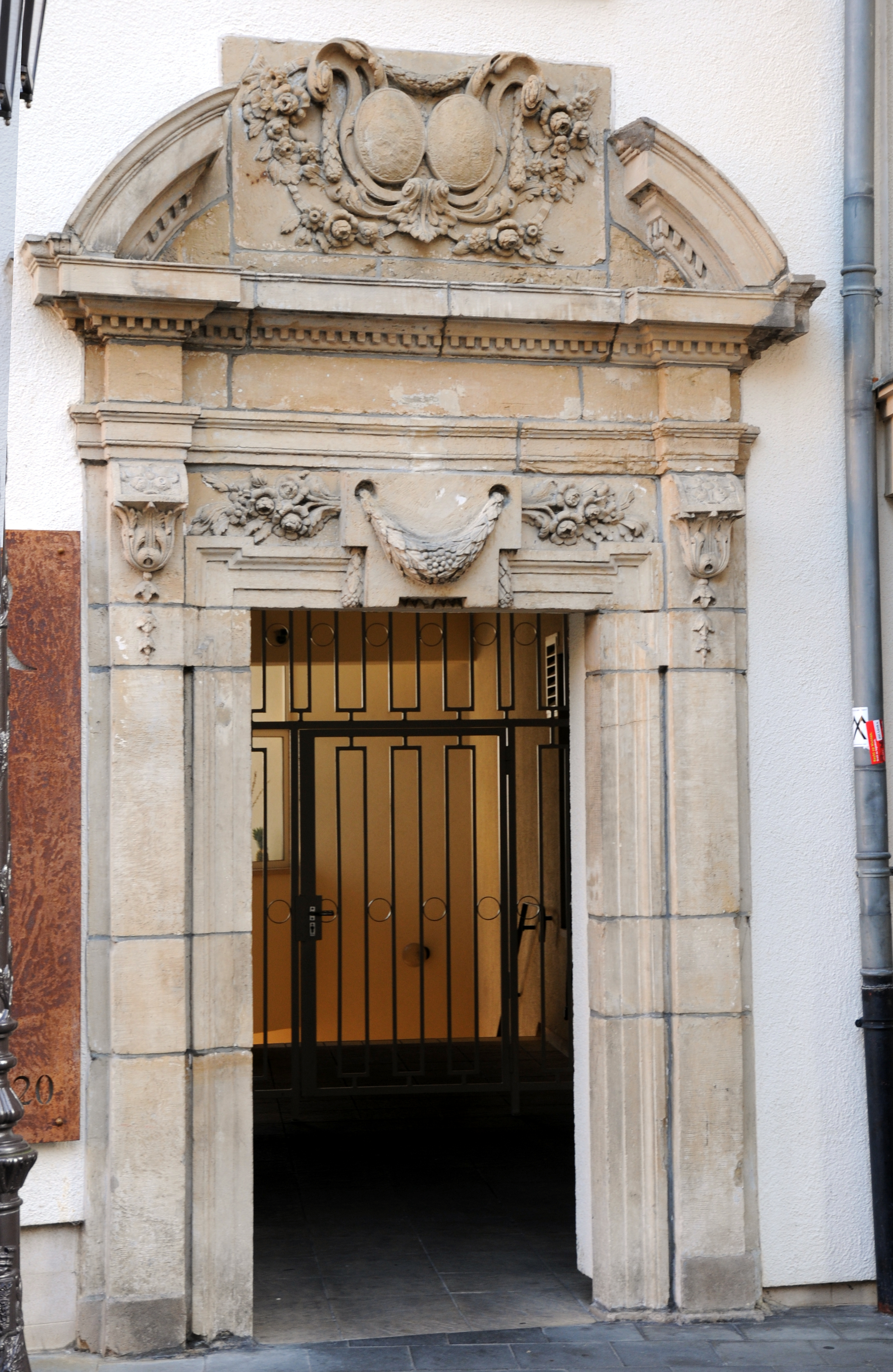 Op Nummer 20, Waassergaass (Stad Lëtzebuerg).